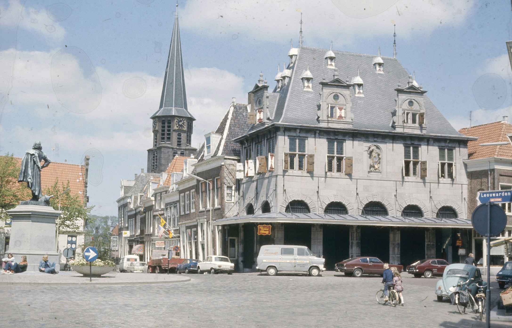 WAAG: Exterieur OVERZICHT